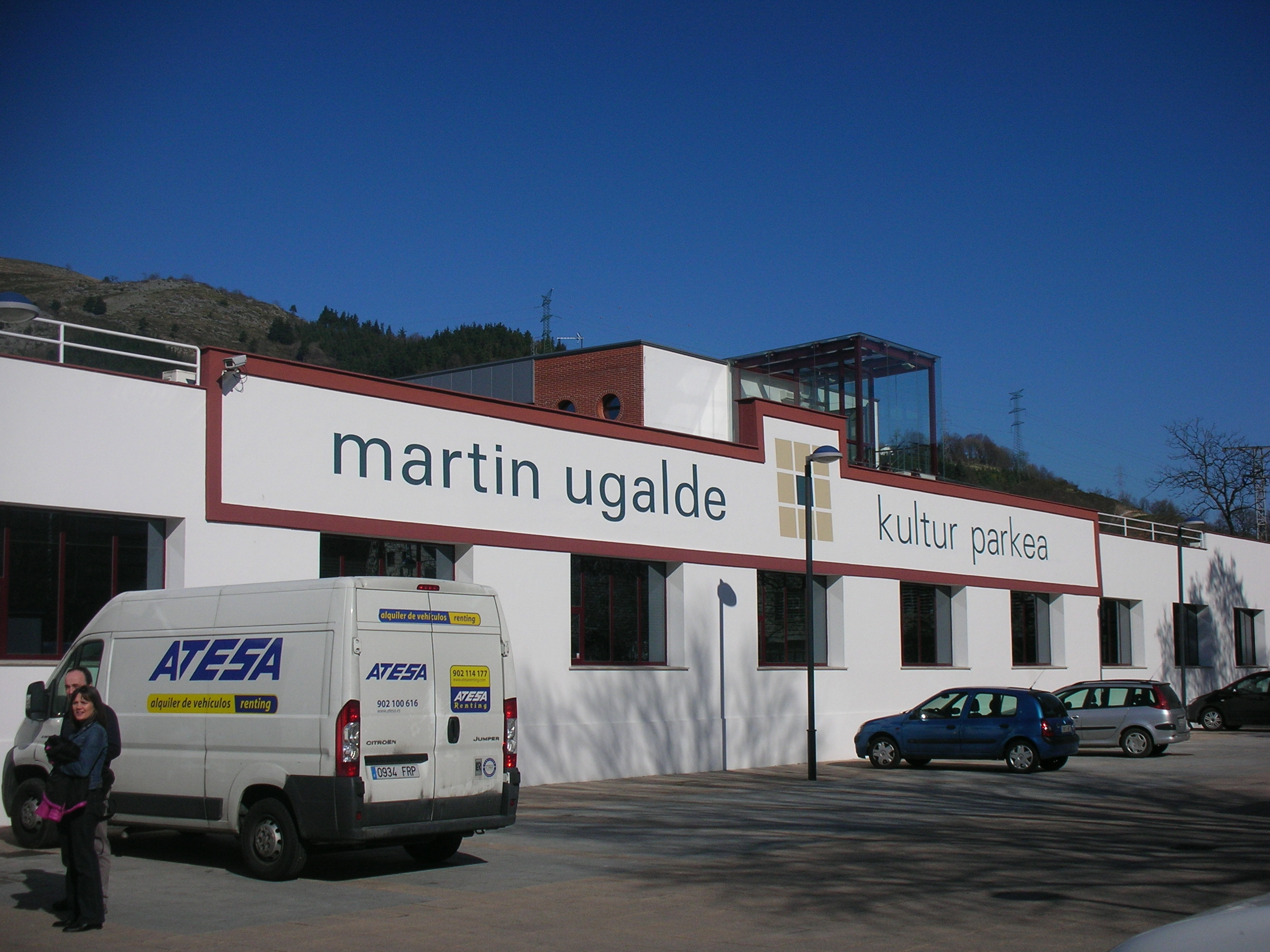 Parque Cultural Martin Ugalde, en Andoain (España).